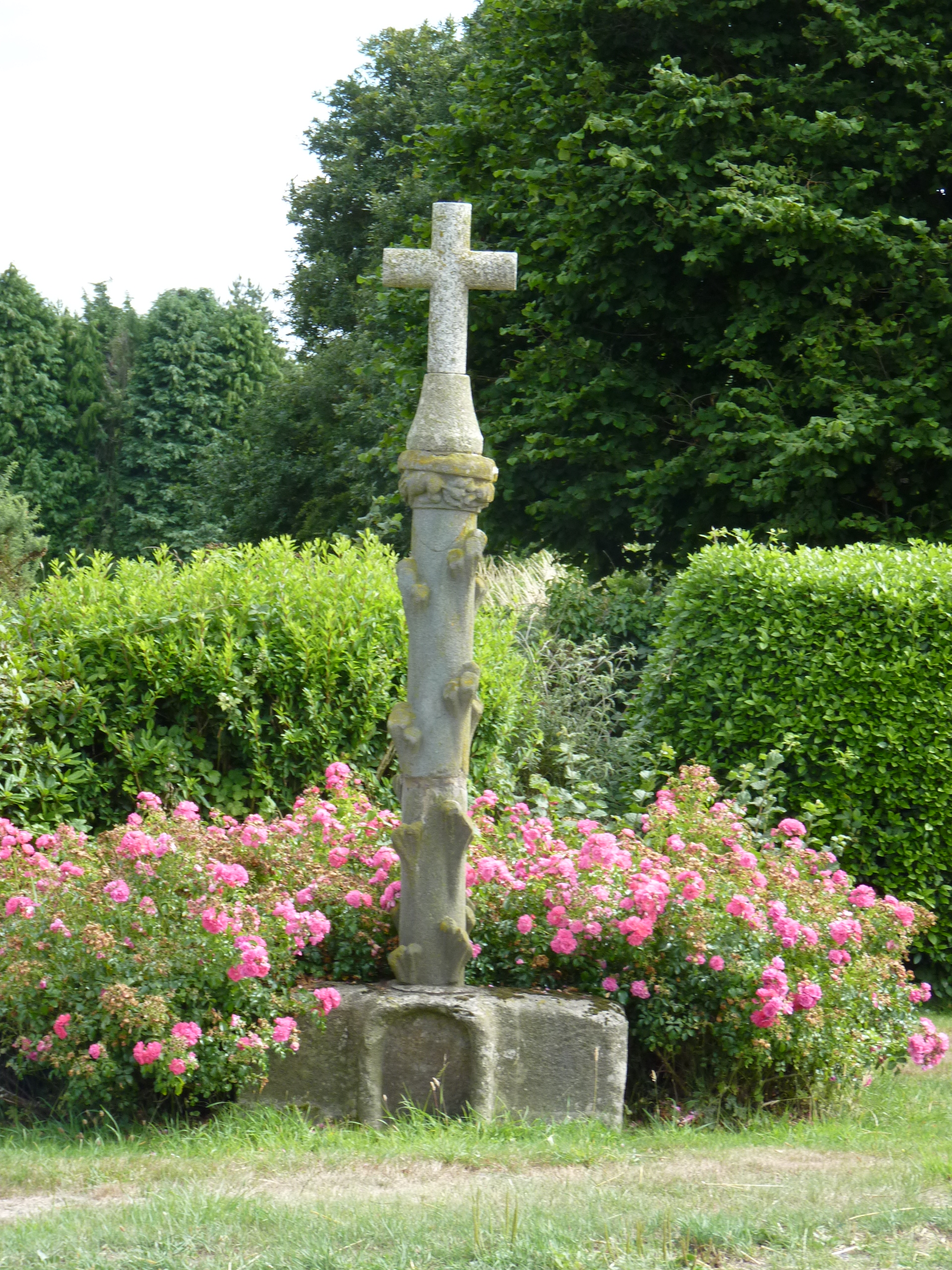 Croix du 16ème siècle en bordure de route.